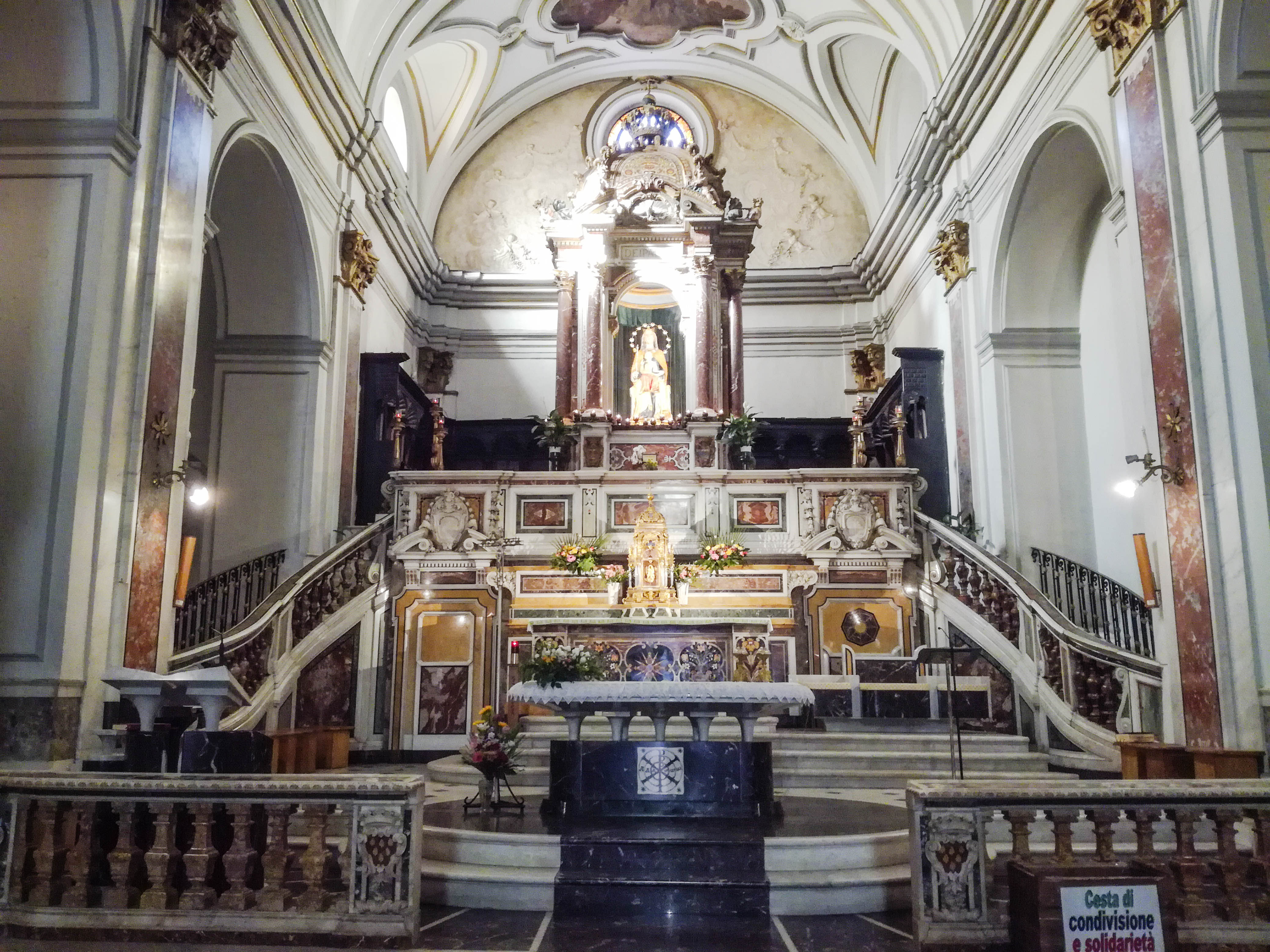 Interno della Chiesa di Santa Maria di Piedigrotta